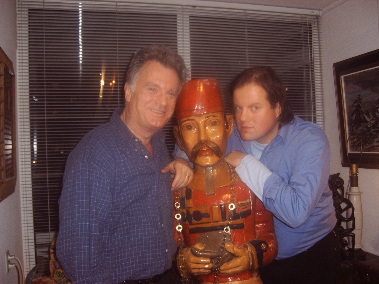 Carol van Herwijnen thuis met Corné Henri Bibo